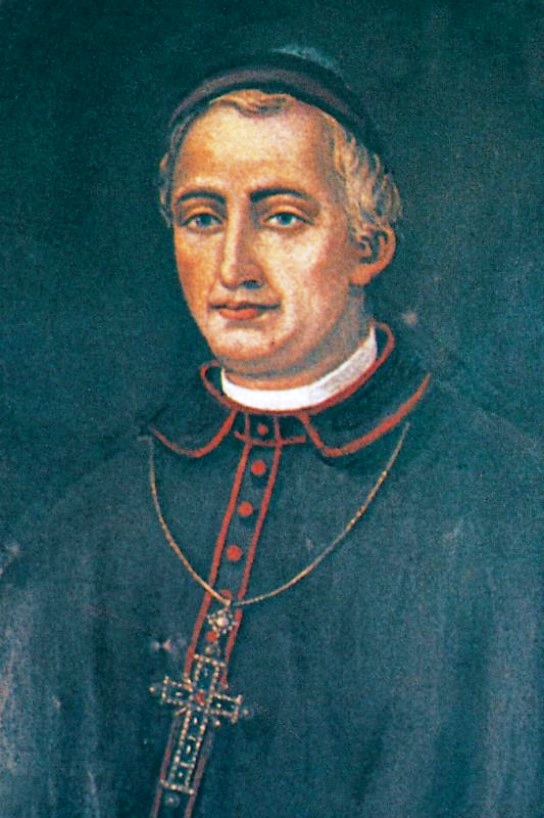 Alonso II de Fonseca foi arcebispo de Sevilla.